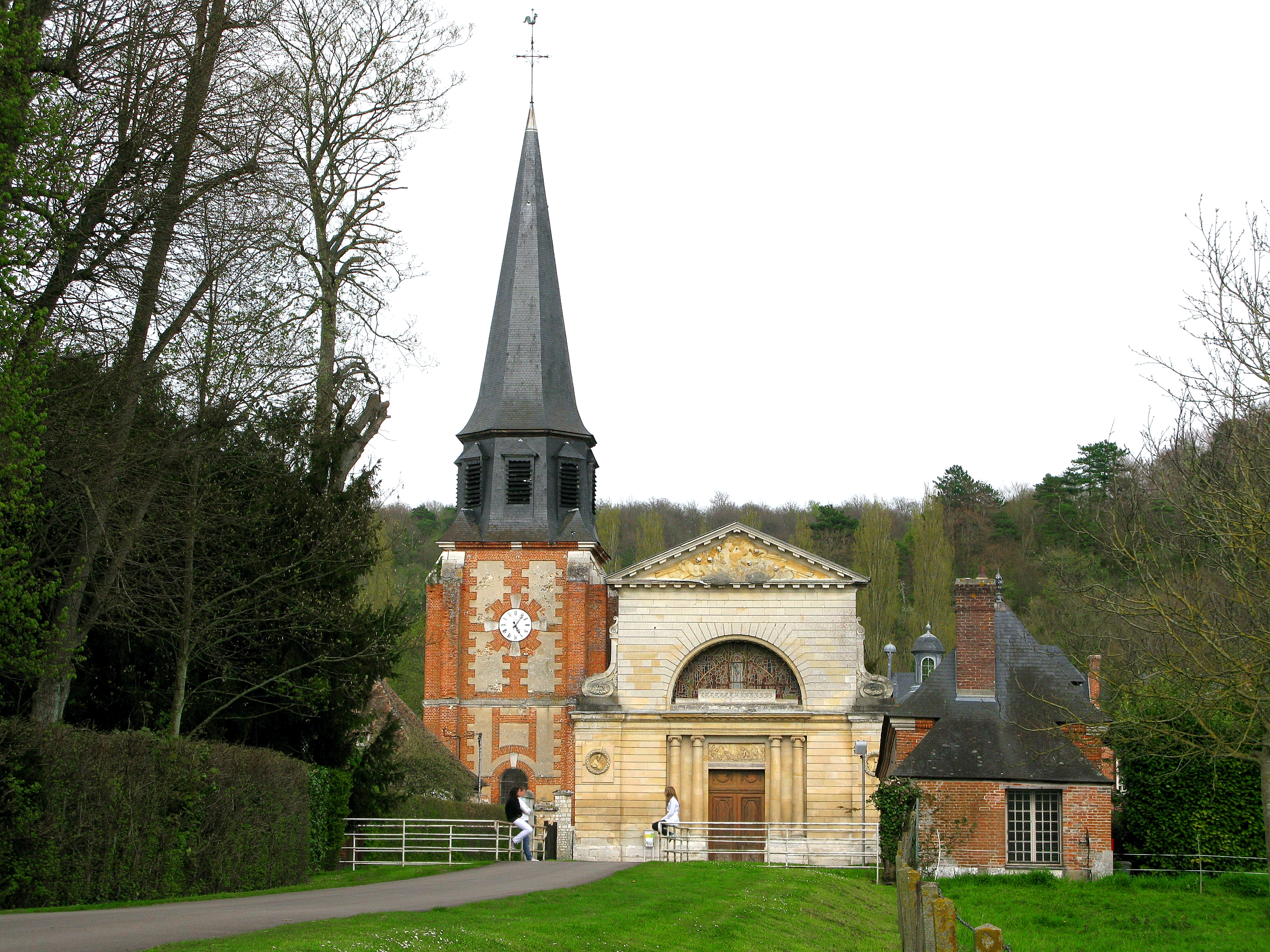 Façade de l'église d'Acquigny (France - Normandie - Eure)